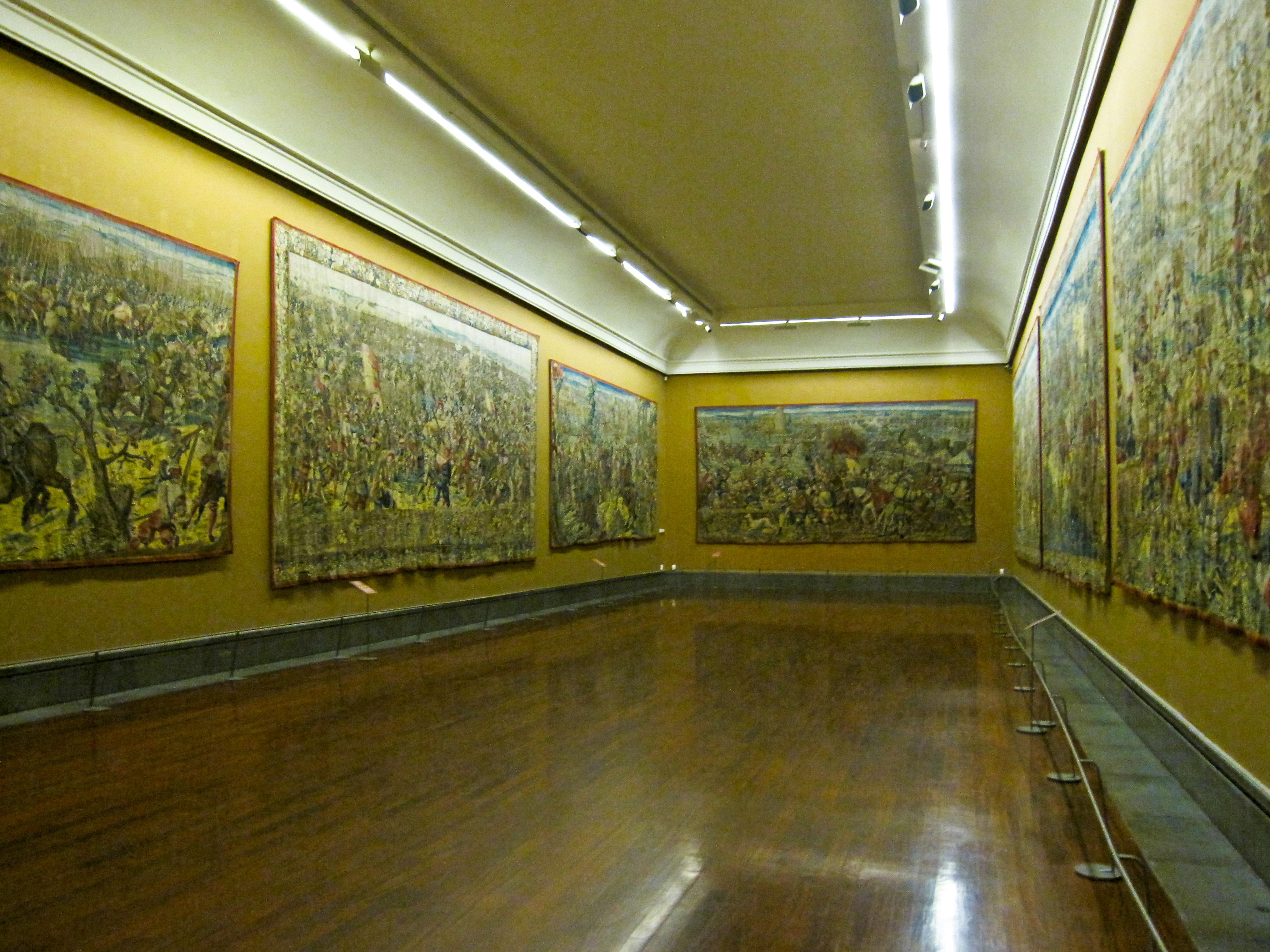 La sala degli arazzi del museo di Capodimonte (Napoli)